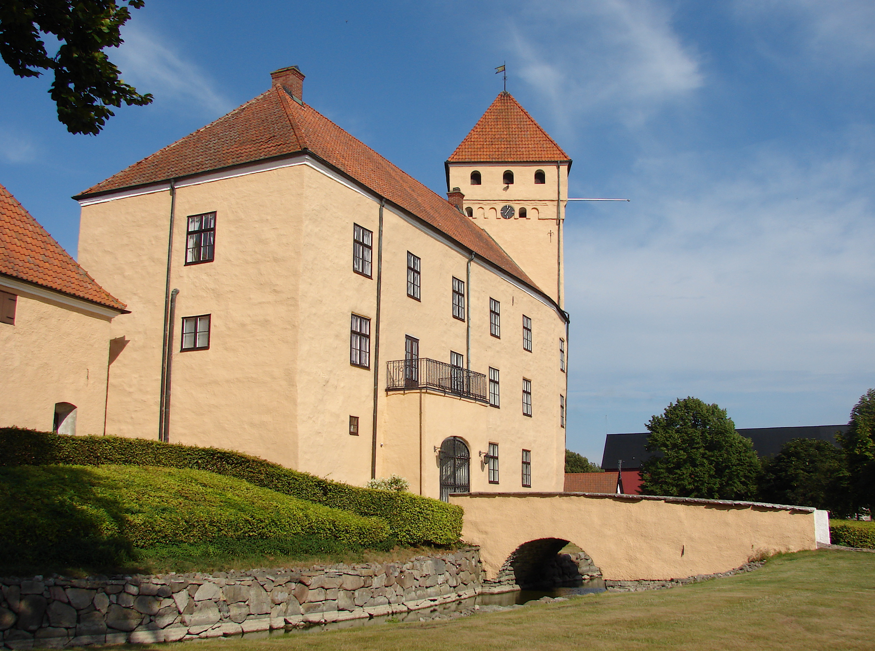 Tosterup med voldgrav